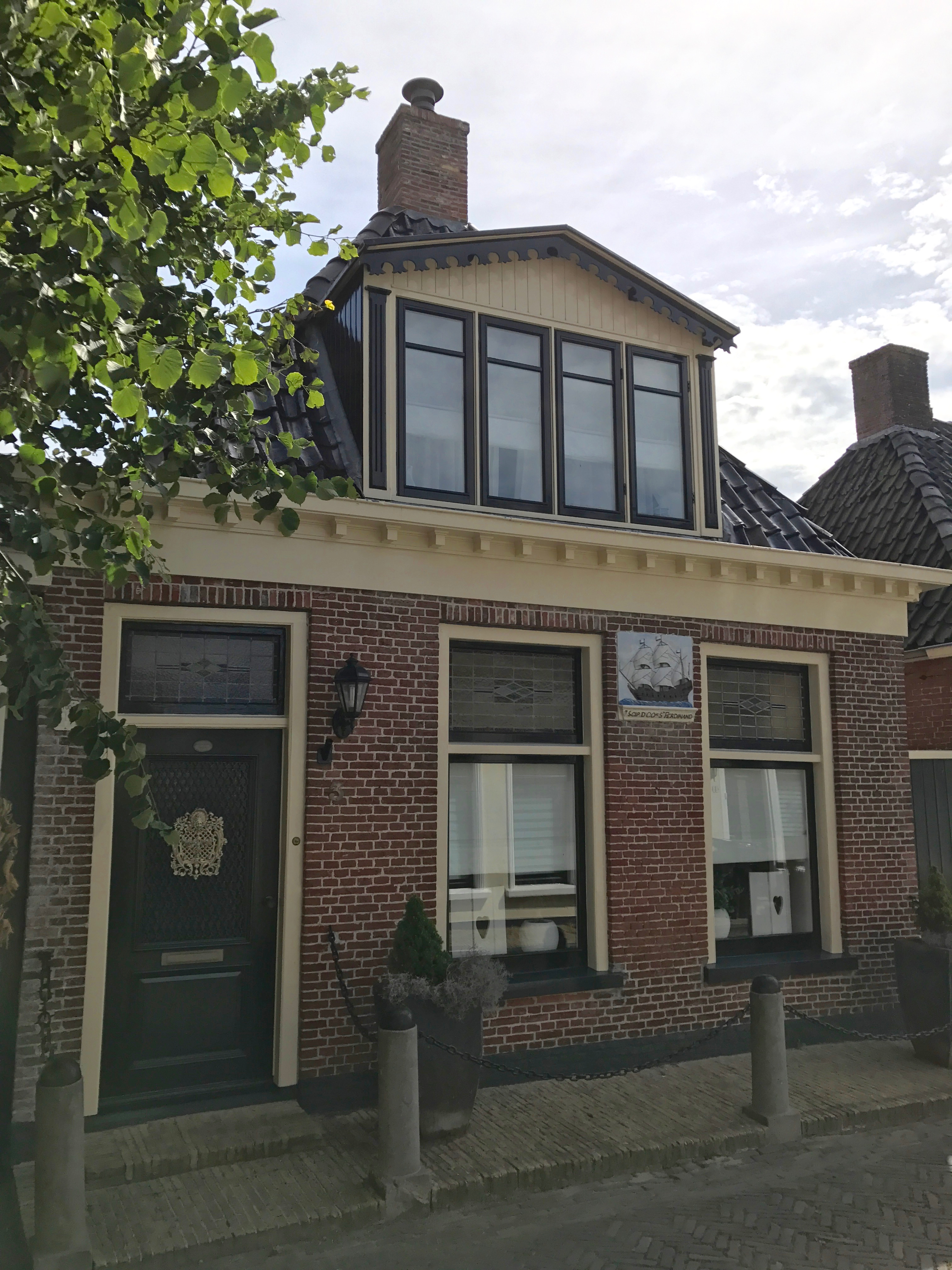 Alde Buorren 3